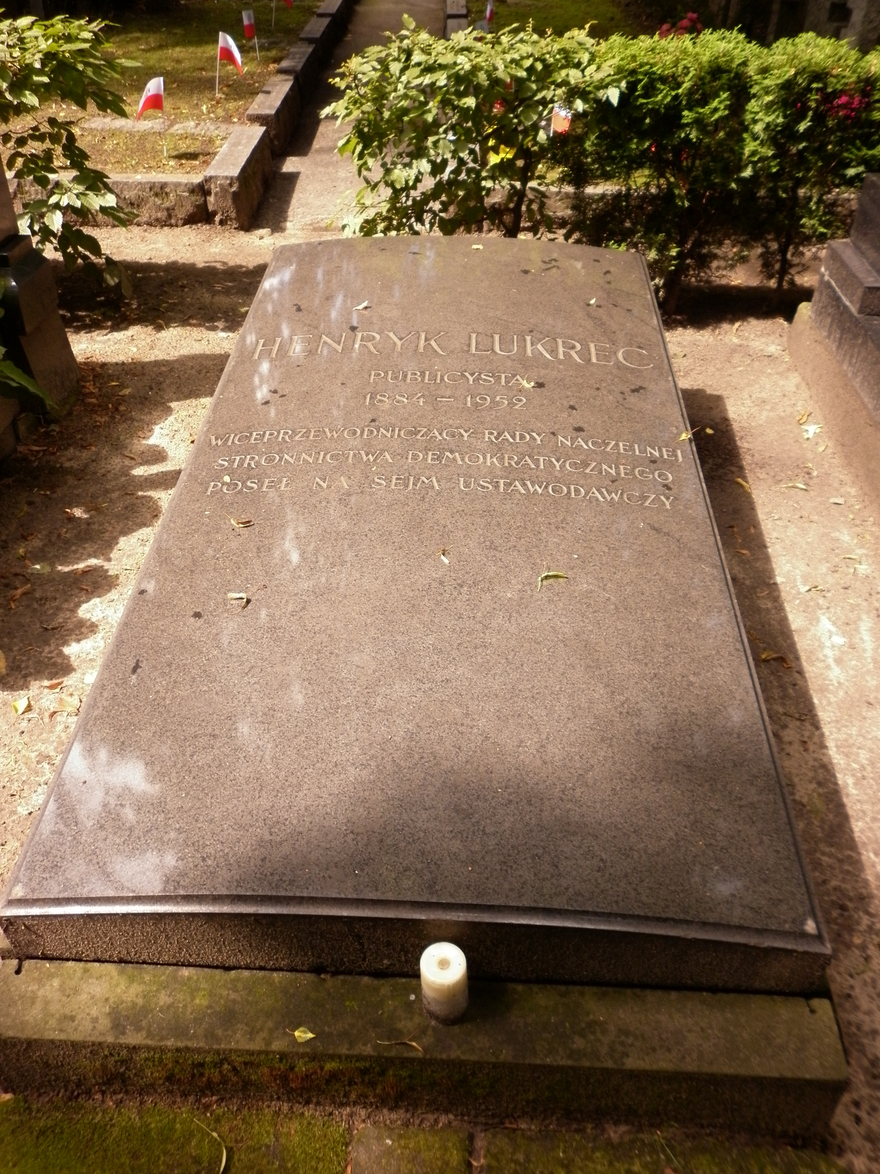 Grób Henryka Lukreca na Wojskowych Powązkach